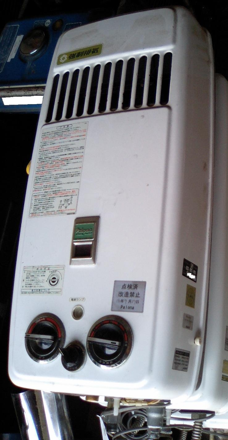 取り外されたパロマ製リコール瞬間湯沸かし器PH-161F